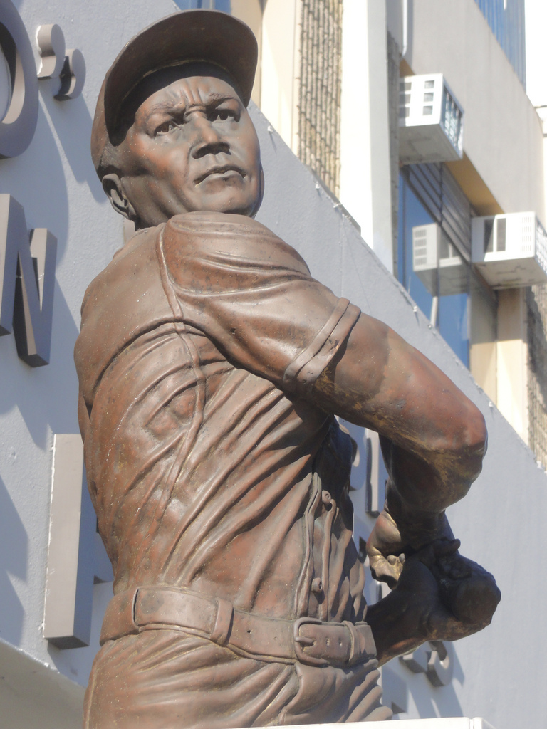 Busto de Francisco Pancho Coimbre, frente al Edificio Francisco "Pancho" Coimbre, Secretaria de Deportes Municipal, Avenida Las Americas y PR-2R, Barrio Canas Urbano, Ponce, Puerto Rico